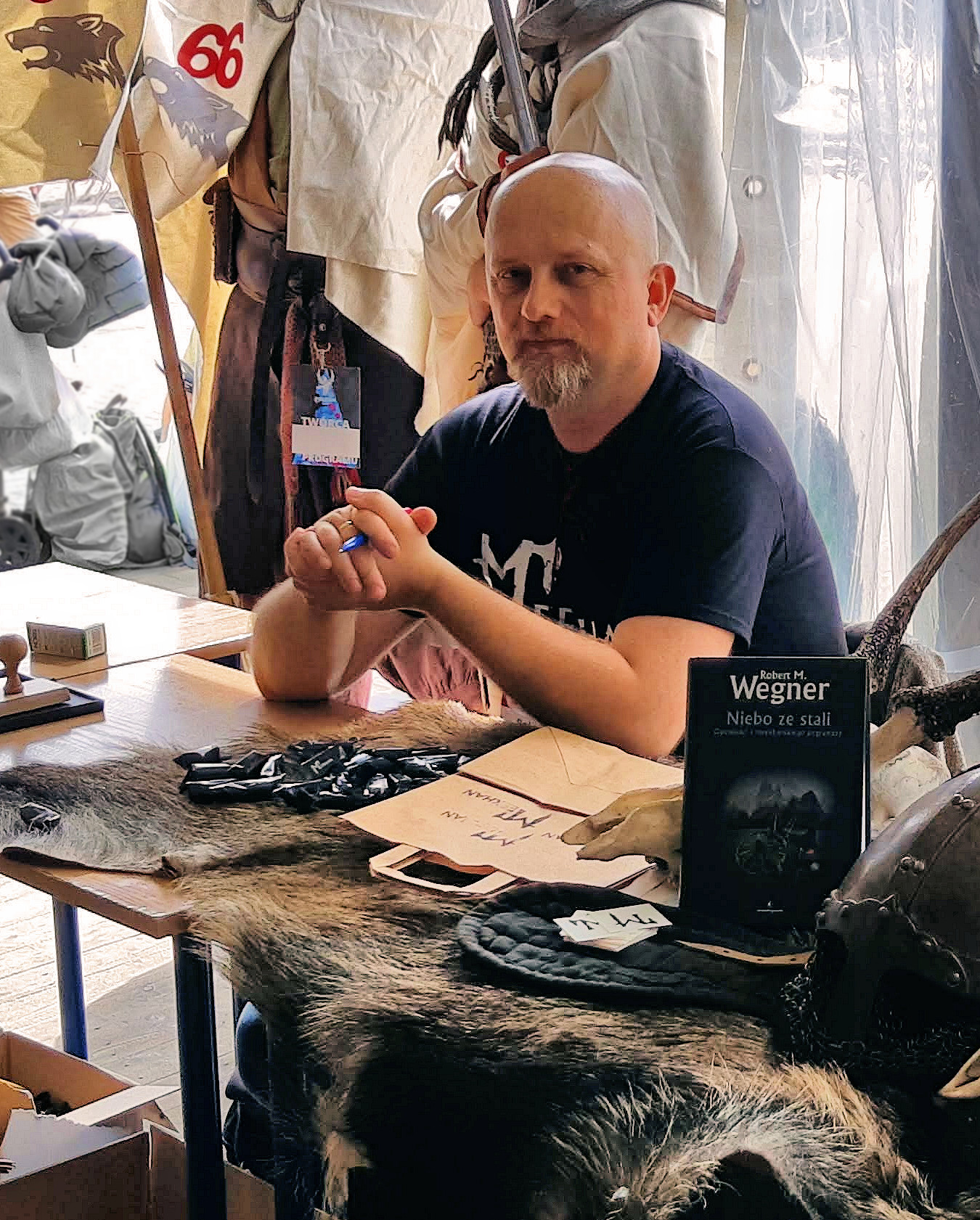 Robert M. Wegner na stoisku promującym "Opowieści z meekhańskiego pogranicza" (Meekhan), Polcon 2018 w Toruniu